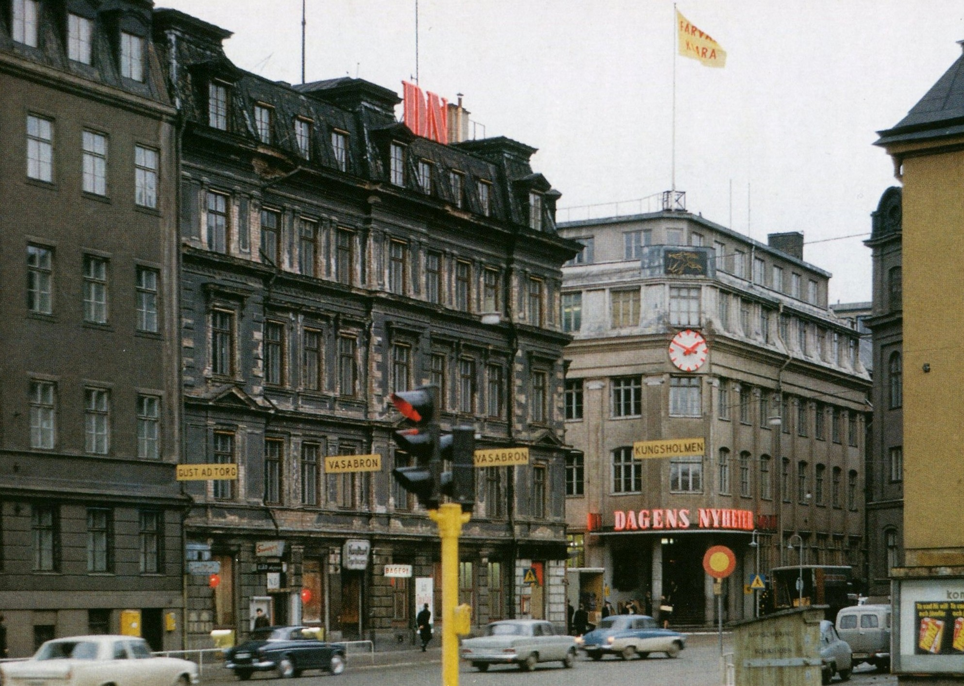 Karduansmakargatan. Dagens Nyheter i Klara i kvarteret Sköldpaddan (revs 1969) Arkitekter för ombyggnad Ullrich & Hallquisth